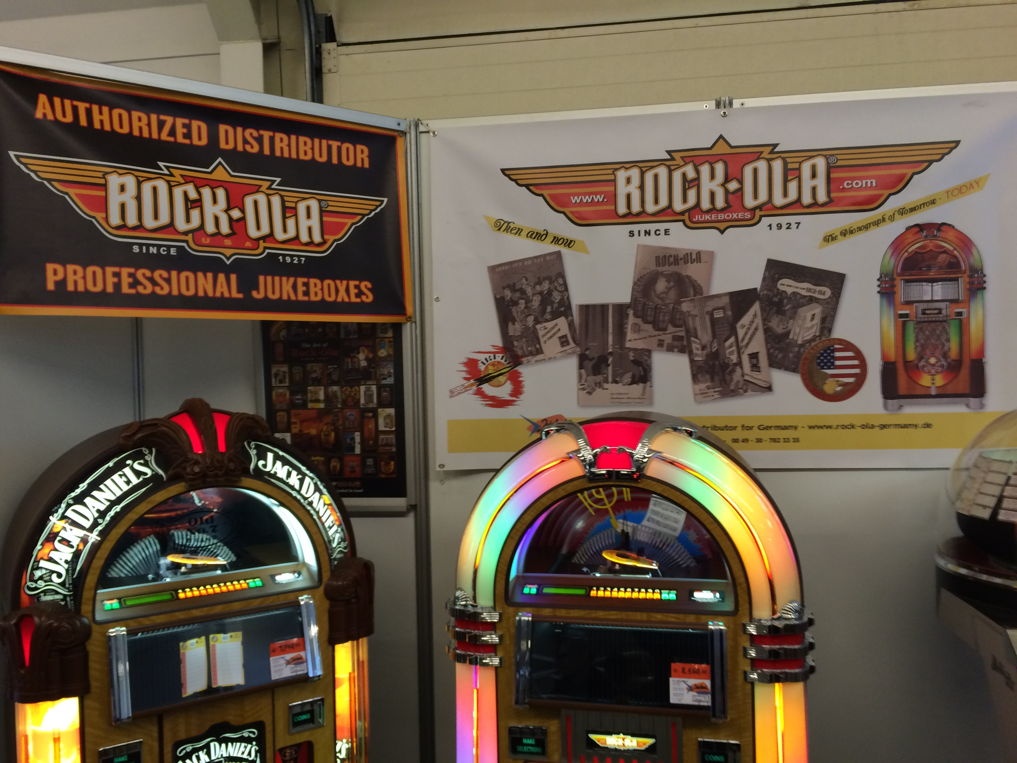 Stand von Rock-Ola-Germany in Rosmalen anlässlich der Rock aruond the Jukebox 2015